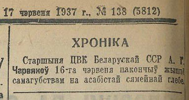 Зацемка пра самагубства Аляксандра Чарвякова ў № 138 газеты «Звязда» ад 17 чэрвеня 1937 года.